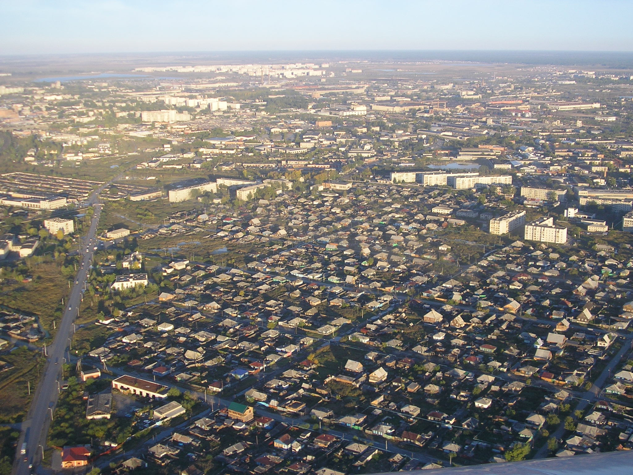 город Курган, панорама, 2005 г.